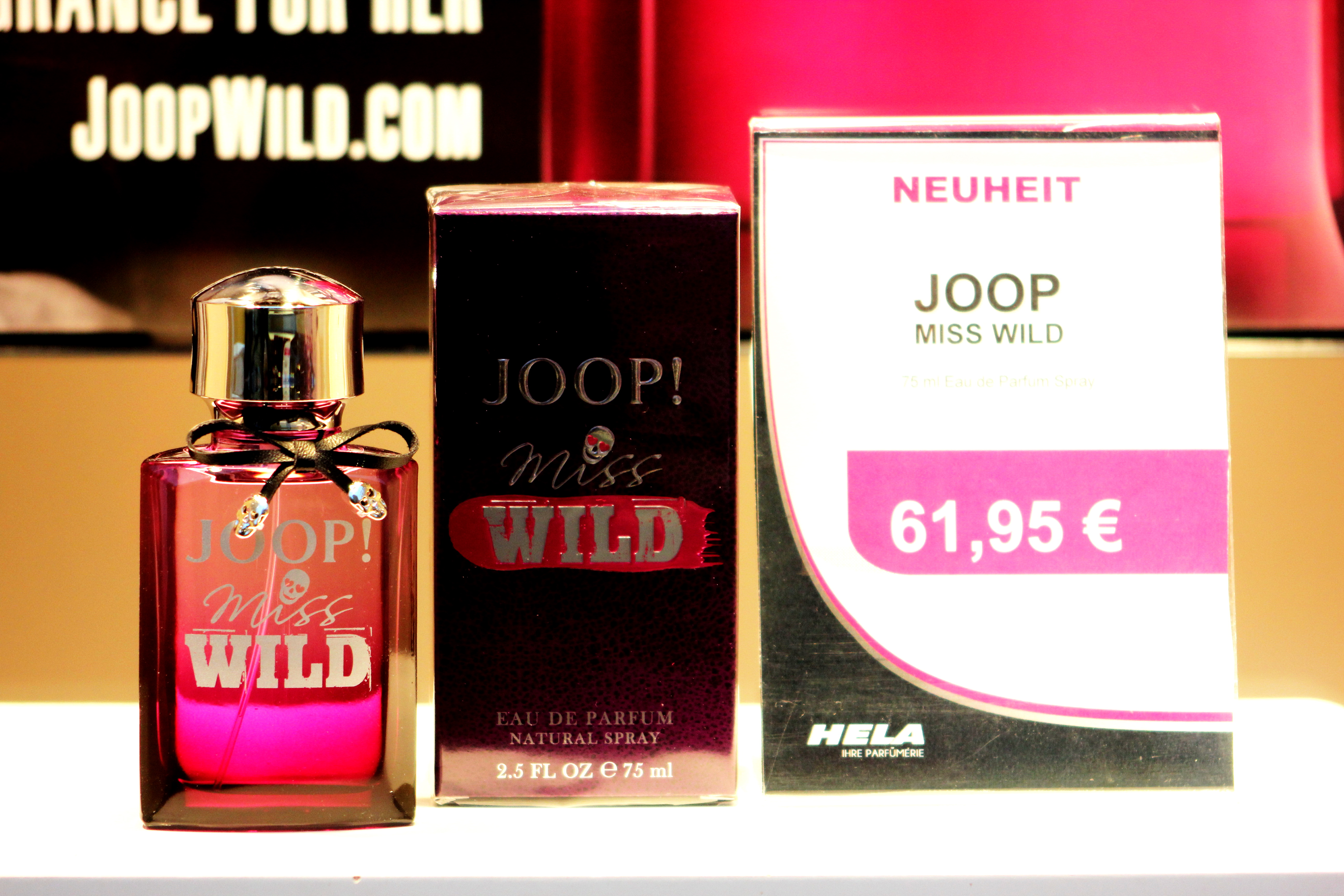 Parfum von Joop Wild Miss in einem Schaufenster mit Preisschild.